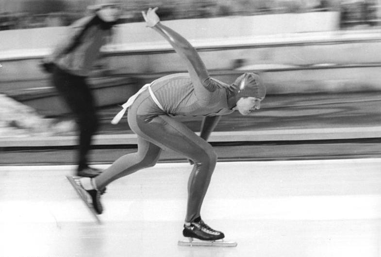 Andre Hoffmann ADN-ZB Thieme 25.11.83 Karl-Marx-Stadt: Länderkampf DDR - UdSSR- Für das herausragende Ergebnis am ersten Tag des Freundschafts-Länderkampfes sorgte der 22jährige Student für Rechtswissenschaften Andre Hoffmann (SC Dynamo Berlin) mit dem 1000-m-Bahnrekord von 1:16,03 min. Damit blieb er fast eine Sekunde unter der alten Bestmarke. -Achtung! Foto von früherem Wettkampf